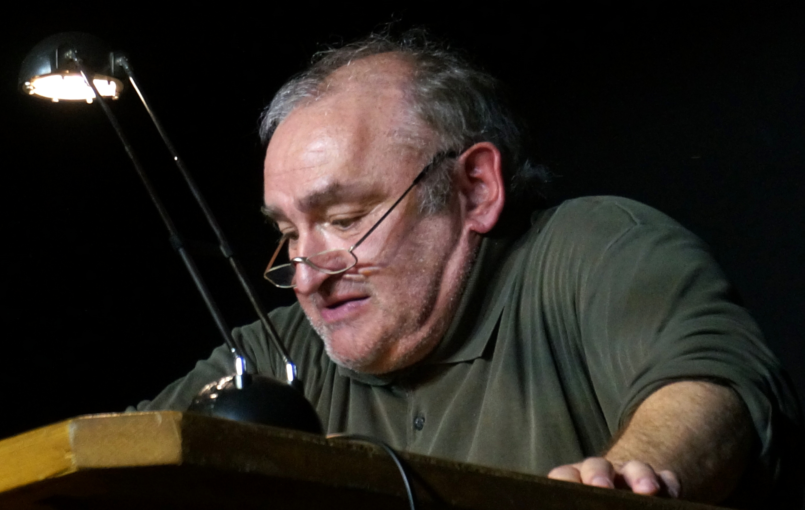 Der deutsche Kabarettist Sigi Zimmerschied bei einer szenischen Lesung aus dem Kreuzeder-Roman "Weißbier im Blut" von Jörg Gaser im "Alten Wirt" in Etterschlag (Mai 2014)